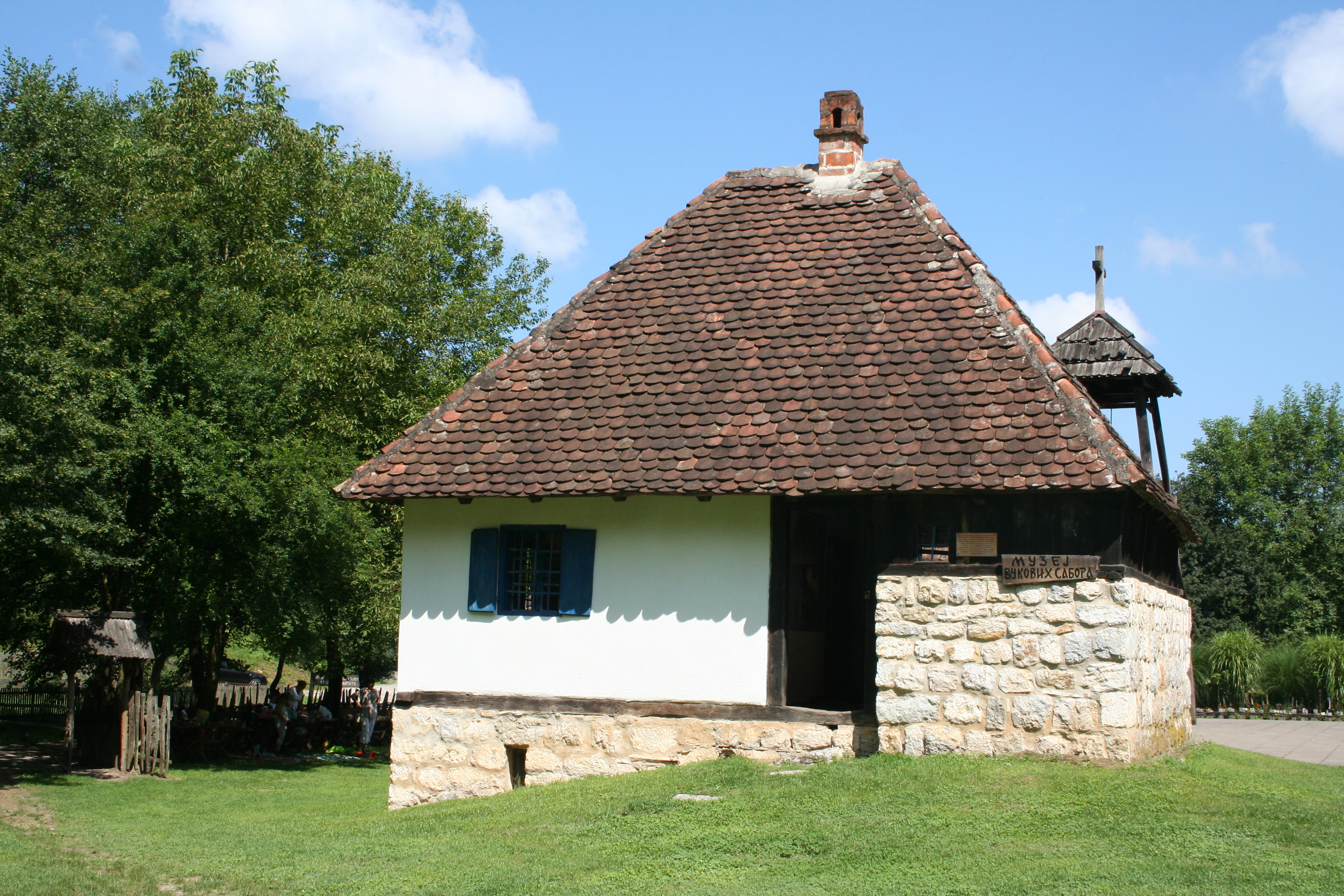 Spomen-kompleks Vuk Stefanović Karadžić, Tršić